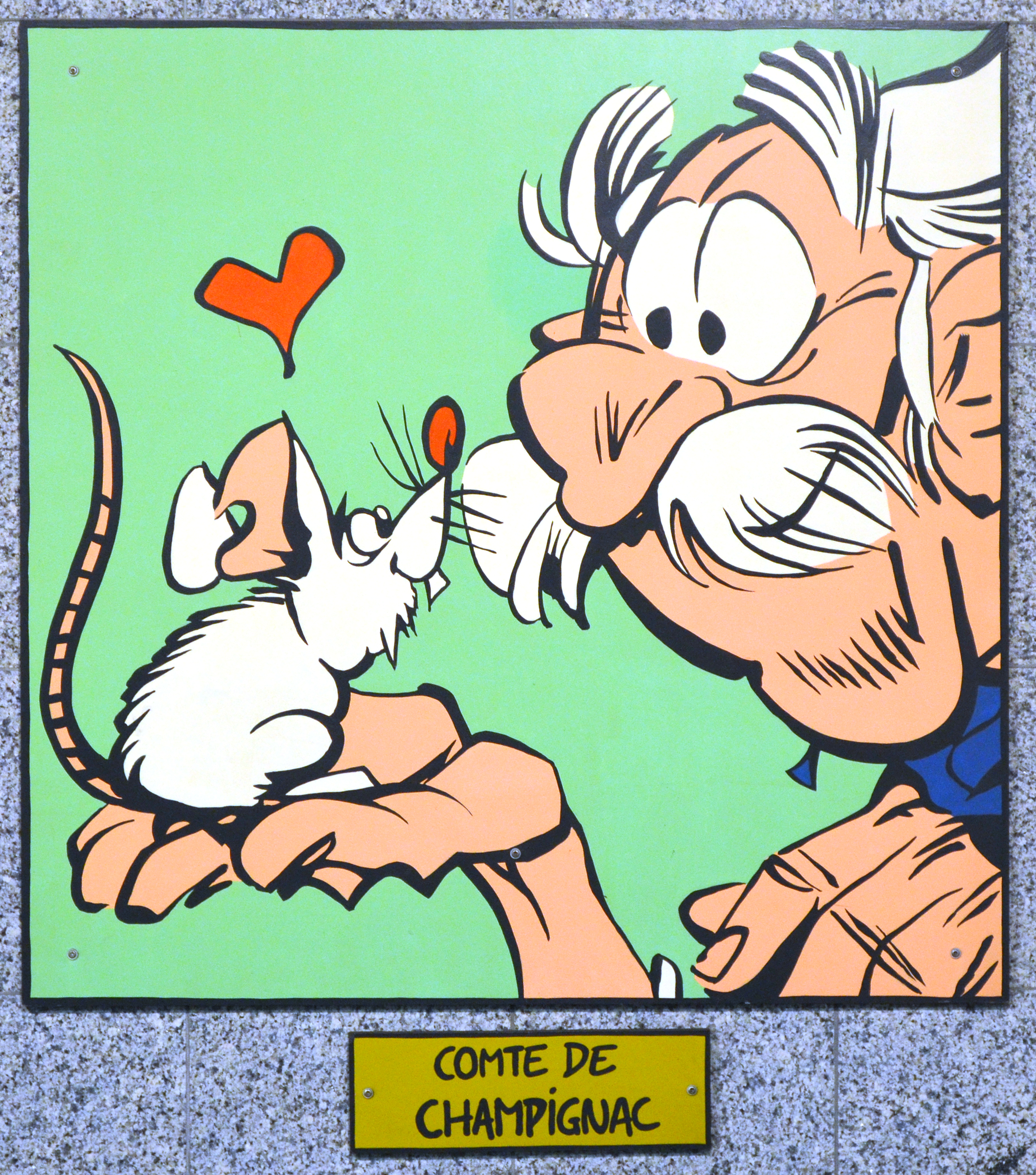 Charleroi (Belgique) - Station Janson du métro léger . Comte de Champignac.